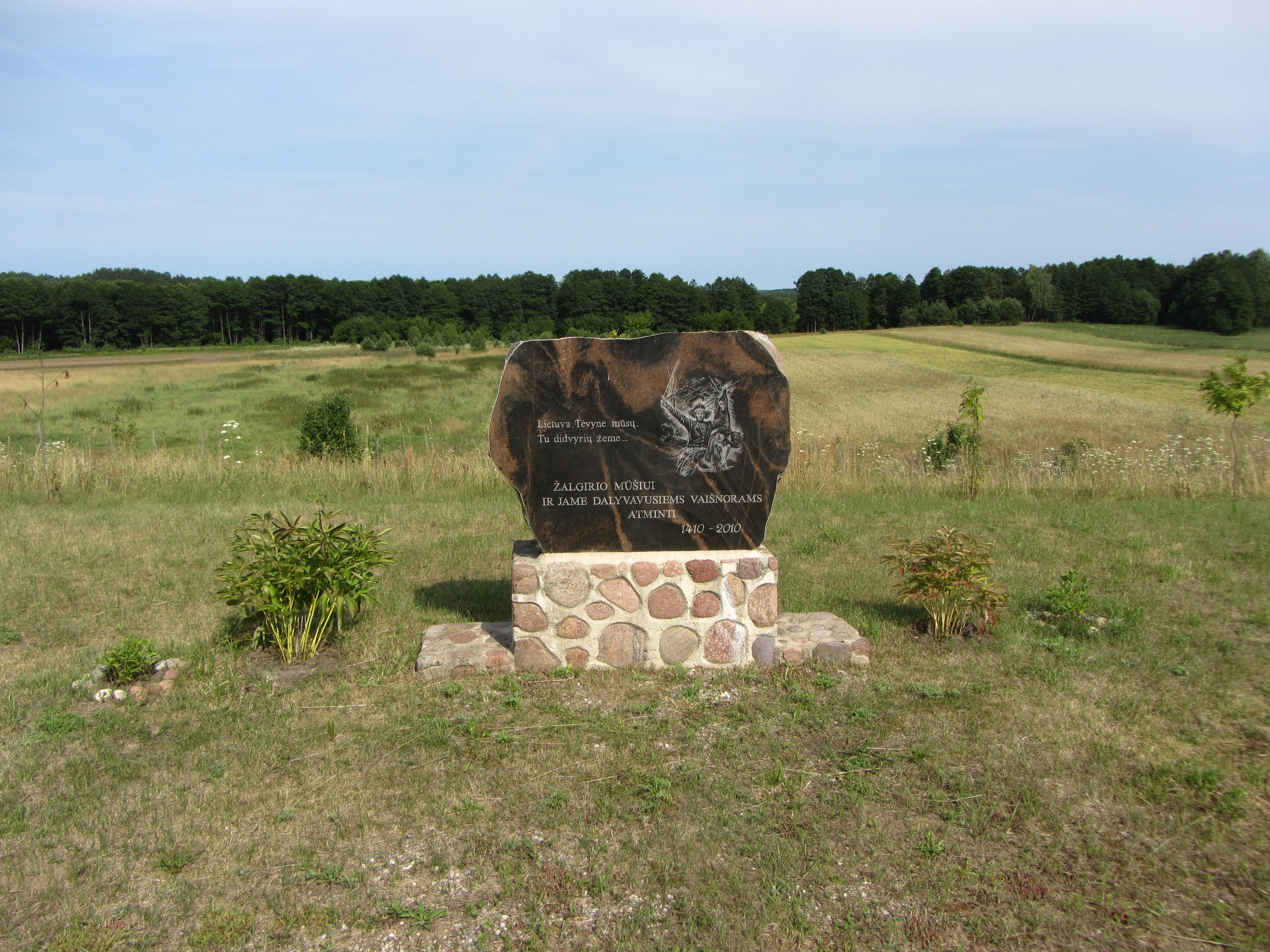 Lipliūnai, Lithuania